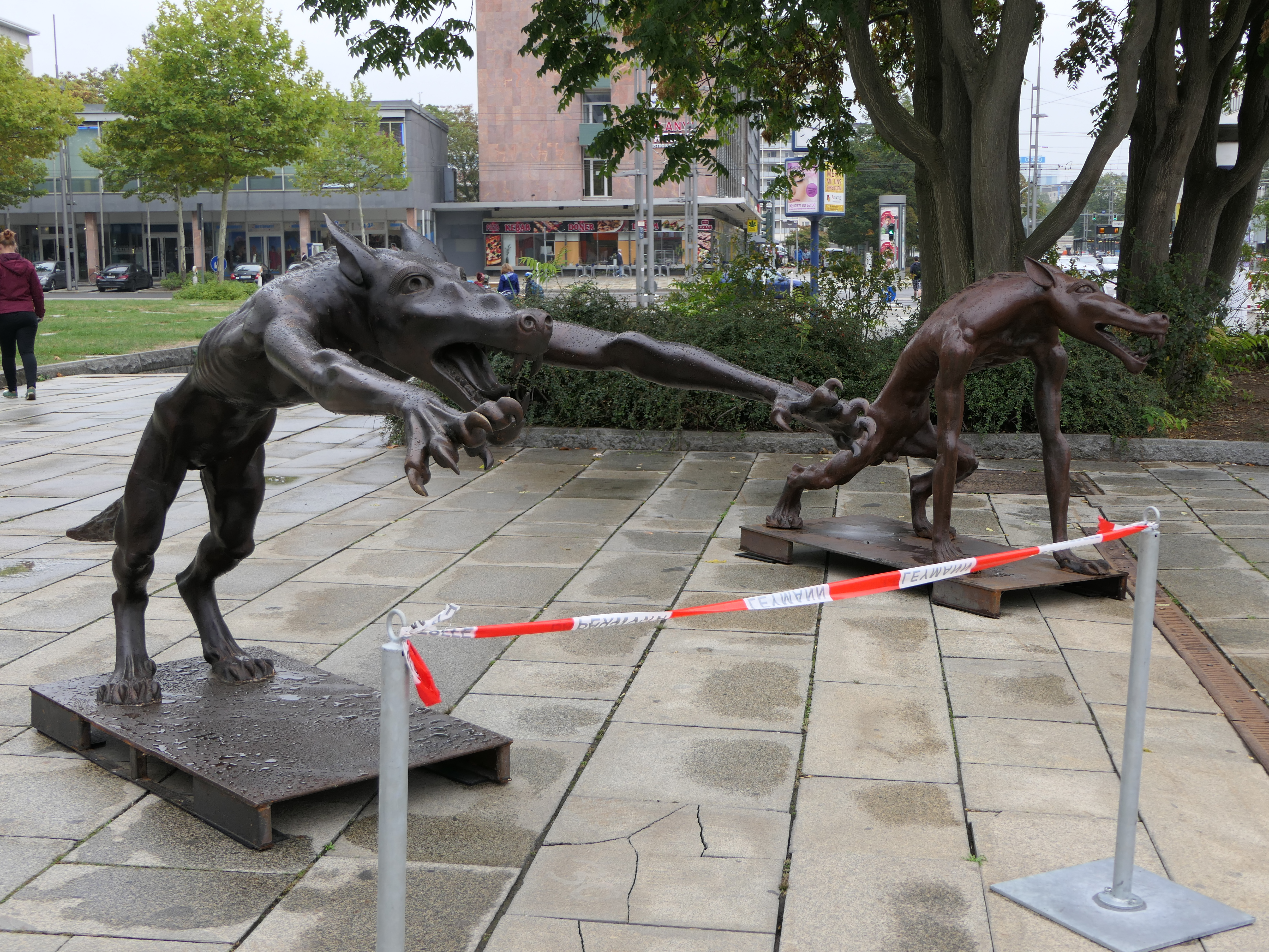 Kunstaktion mit Wölfe-Bronzeplastiken des Brandenburger Künstlers Rainer Opolka am Karl-Marx-Denkmal in Chemnitz gegen Hetze und Gewalt, am 13. September 2018. Einige der Tierplastiken zeigten den Hitlergruß, andere stellten Mitläufer dar.